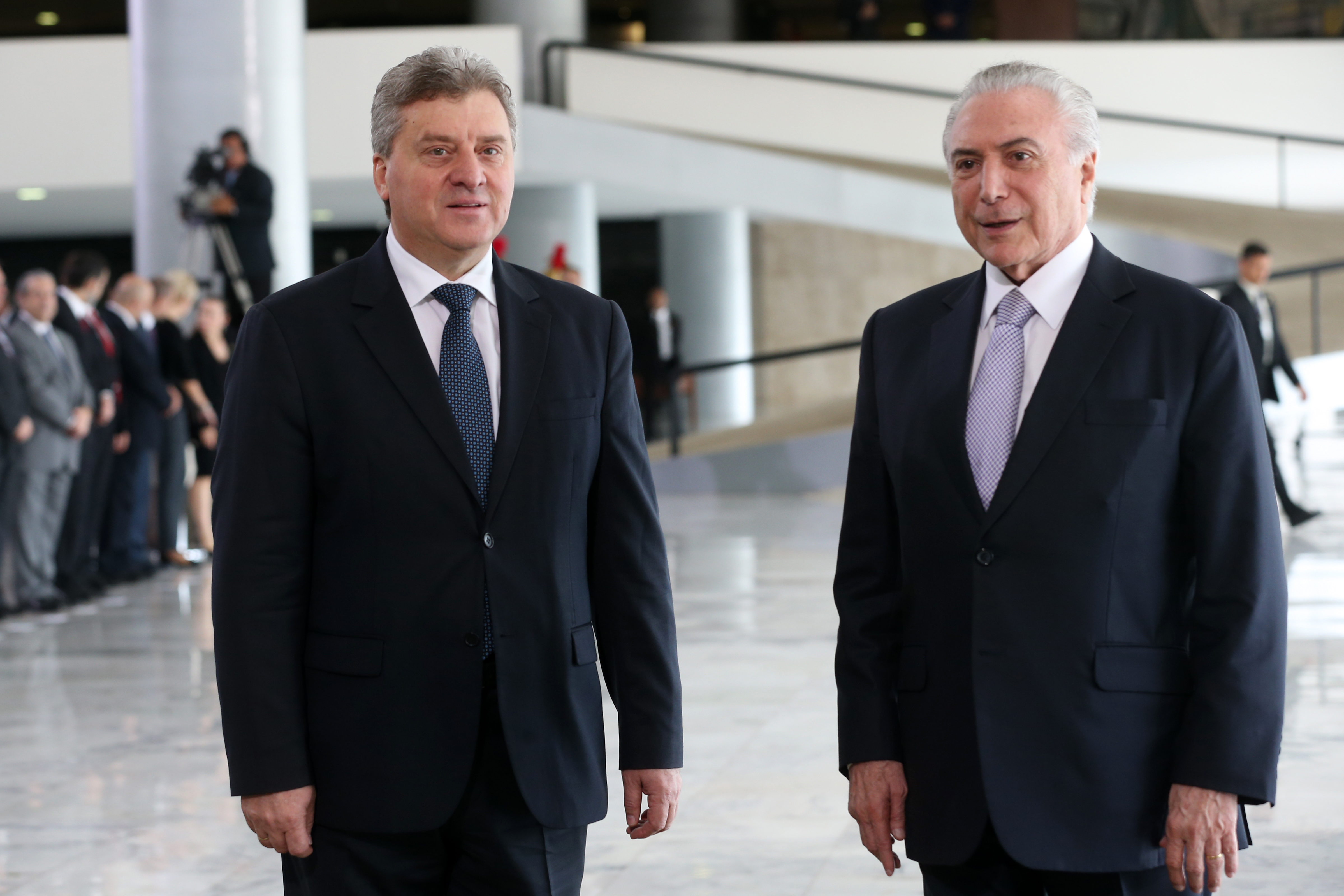 Brasília - O presidente Michel Temer recebe o presidente da Macedônia, Gjorge Ivanov, no Palácio do Planalto (Antonio Cruz/Agência Brasil)